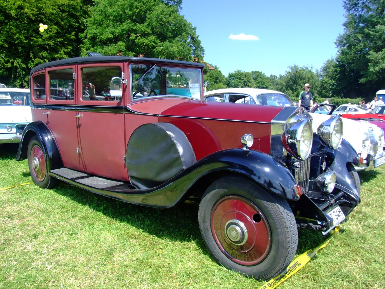 Quelle: selbst fotografiert, 06/2007 Fotograf: Späth Chr.